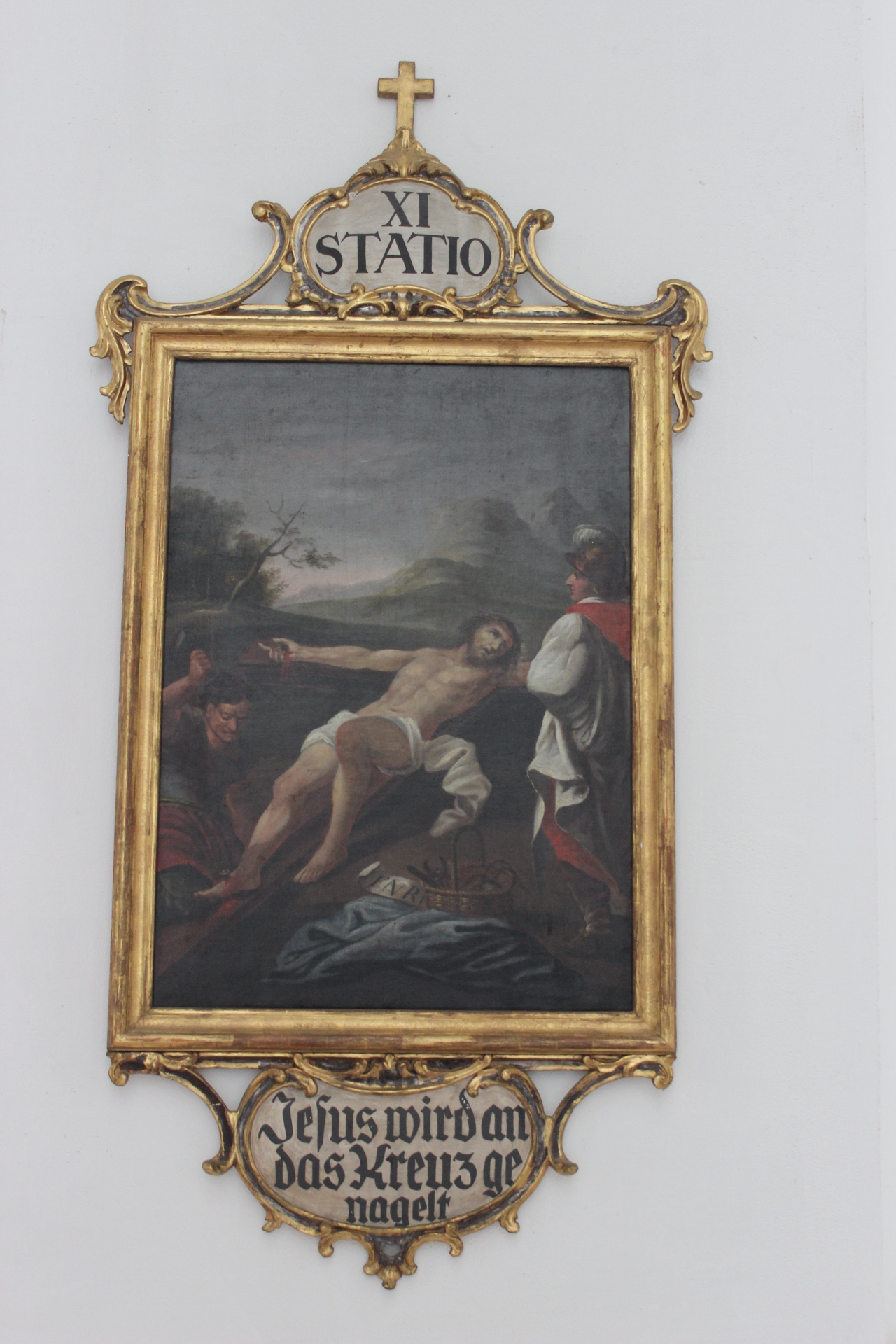 11. Station des Kreuzwegs der Heidelberger Jesuitenkirche